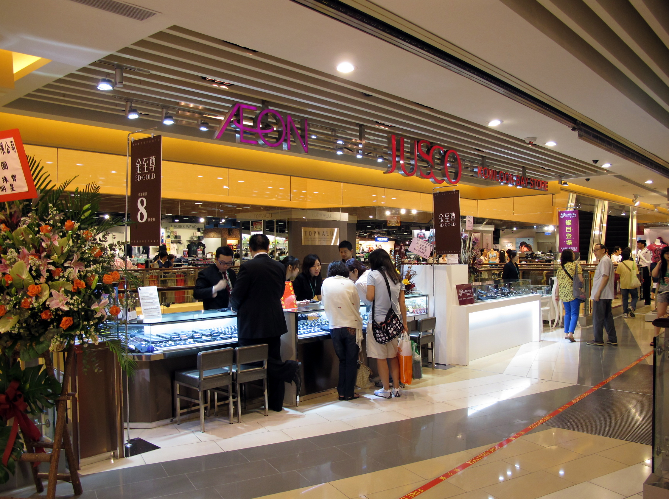 HK MegaBox Jusco Enterance